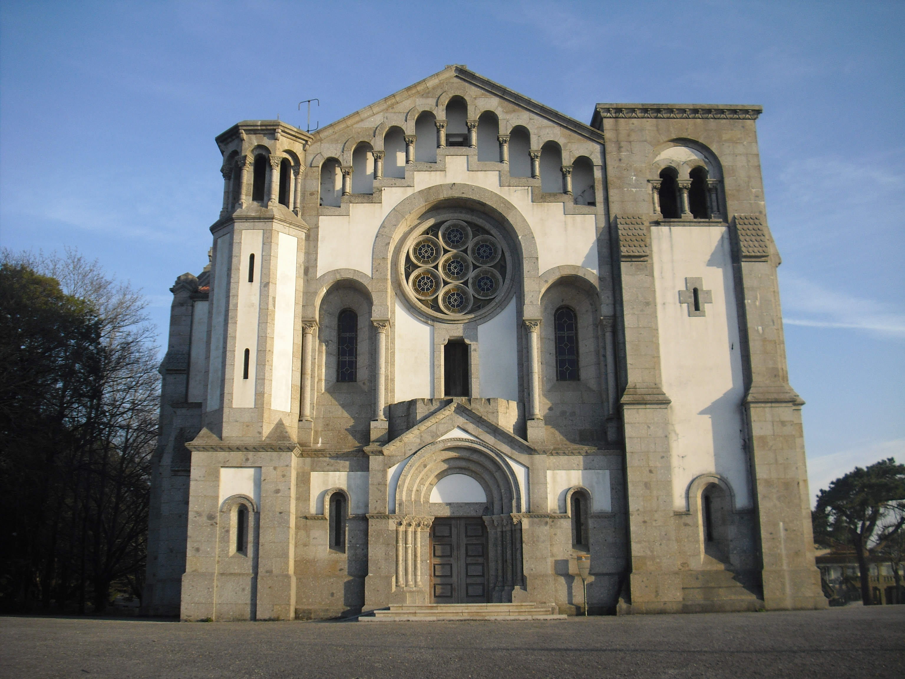 Igreja em Monte Córdova, Santo Tirso.